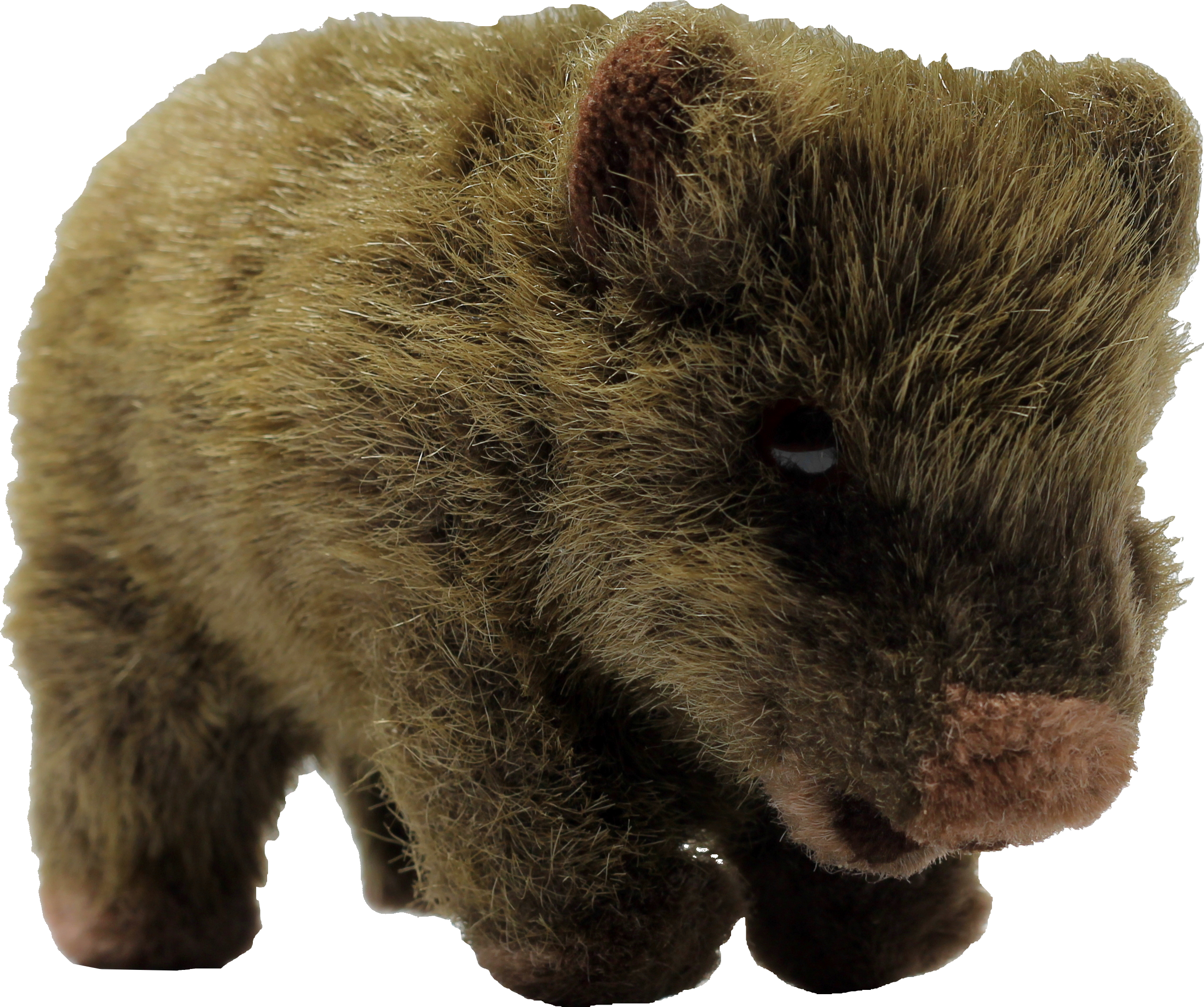 everzwijnknuffel